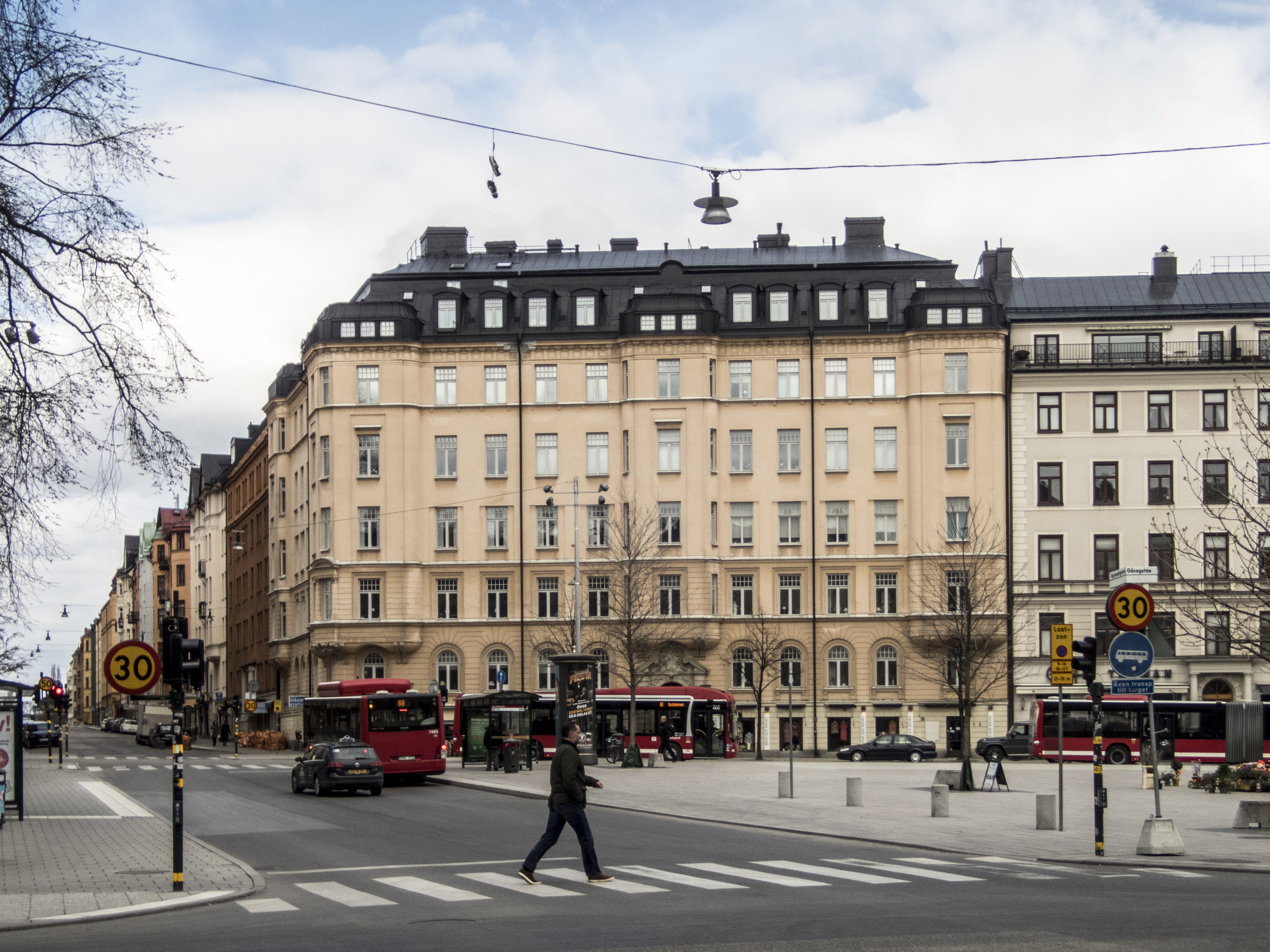 Kejsarkronan 6, Karlbergsvägen 16, Upplandsgatan 52 Stockholm Nybyggnadsår 1902 - 1905 C. E. Andersson (Byggherre) C. E. Andersson (Byggmästare) Dorph & Höög (Arkitekt)